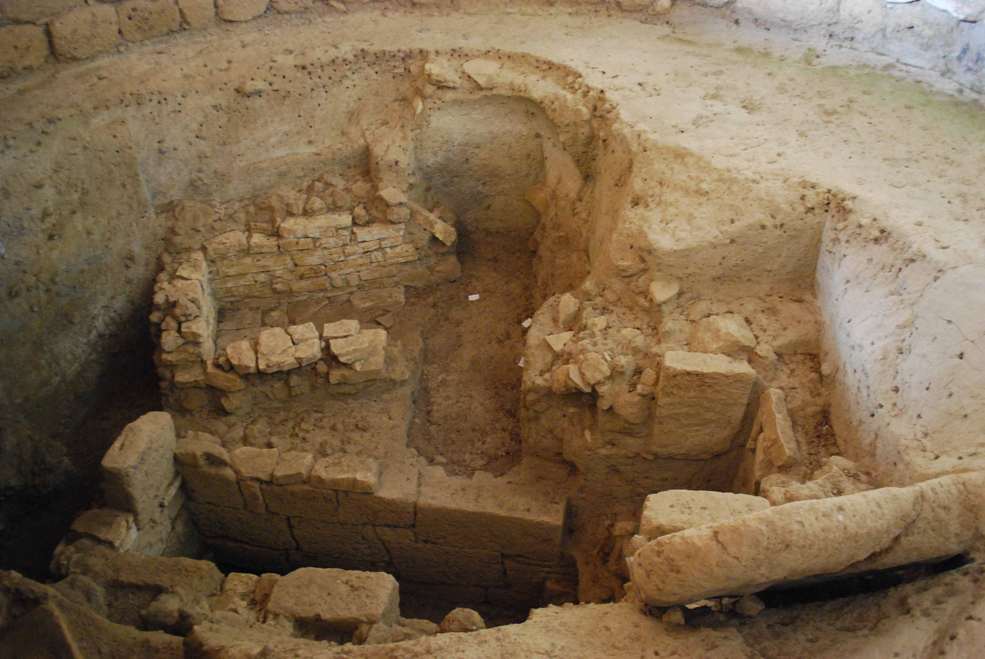 Vue de la tombe mycénienne de Tzanata (Kephalonia).